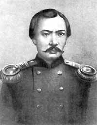 Chokan Valikhanov (Чокан Чингисович Валиханов), Kazav Russian General (b.1835-d.1865)